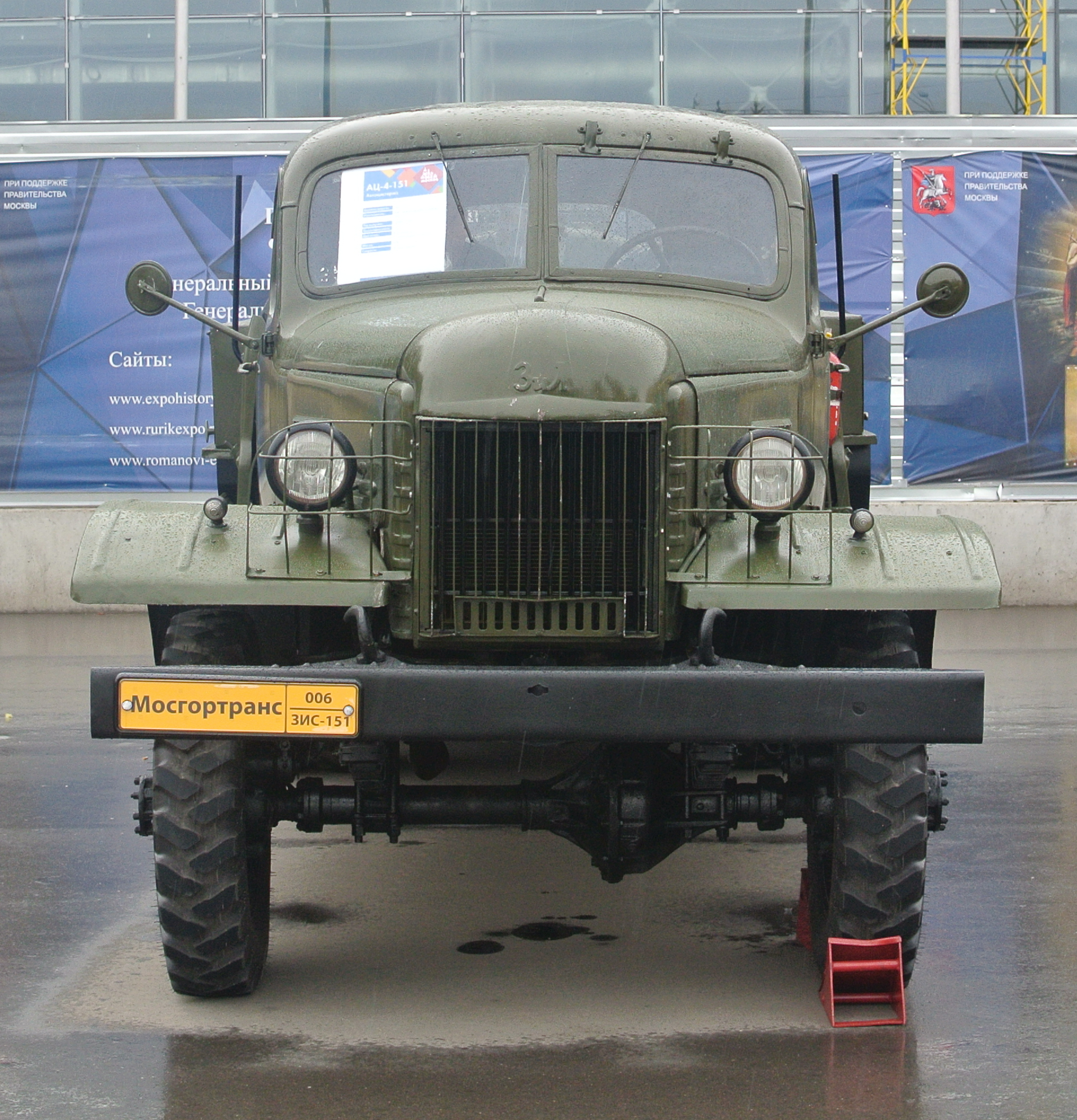 Автоцистерна АЦ-4-151 на базе грузовика ЗИС-151. Экспозиция Мосгортранс на ВВЦ